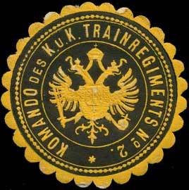 Sealing stamp Title: Kommando des K.u.K. Trainregiments No. 2 Description: Eisenbahn, gelb, schwarz, geprägt Place: size: 4 cm